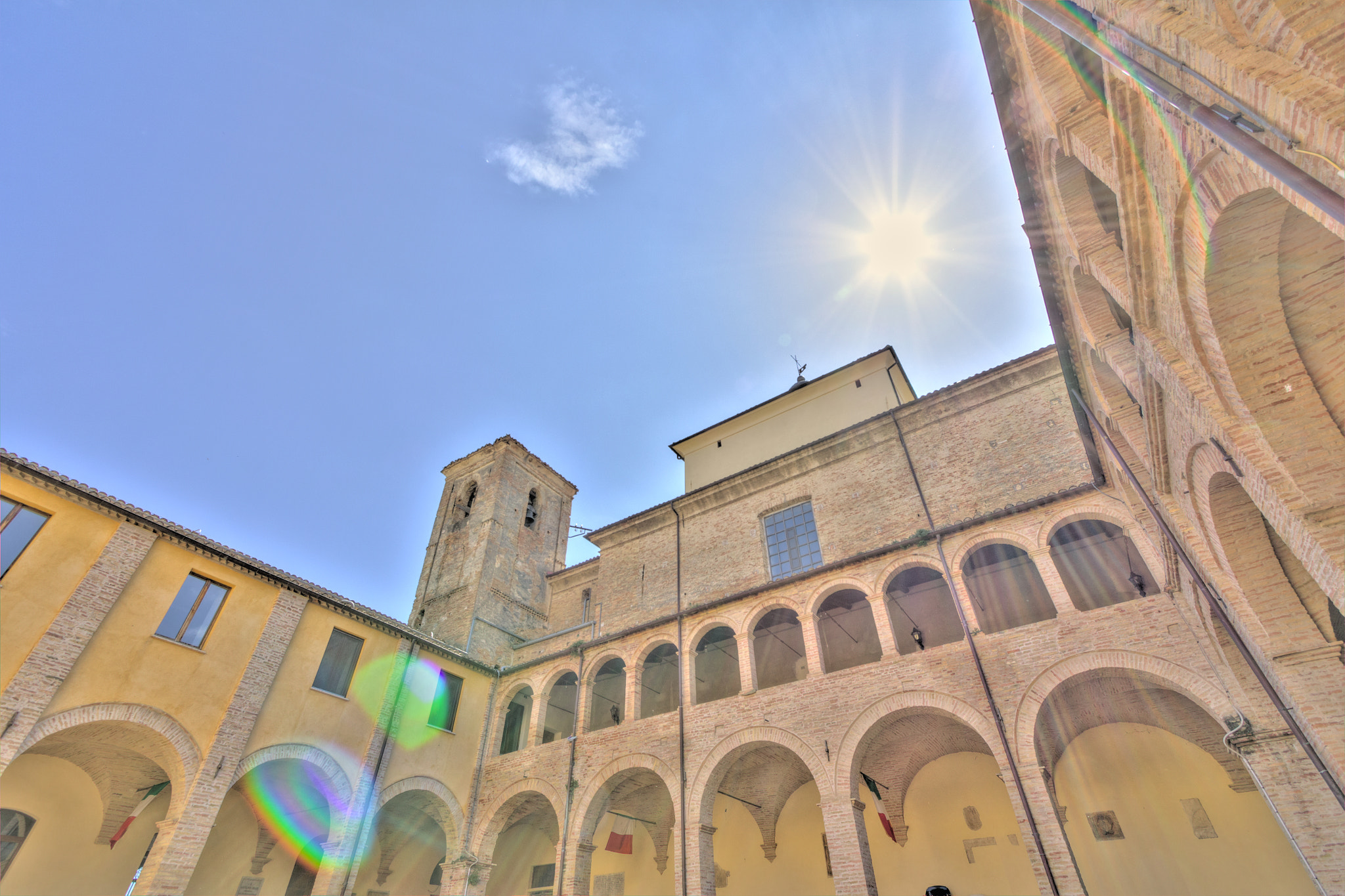 500px provided description: Comune di Penne HDR / 3 Pictures [#HDR ,#Italien ,#Abruzzo ,#Penne]